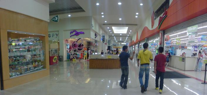 Interior del centro Galerías Metropolitana en Uriangato